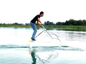 Skipper Sascha Radusch beim Aquaskipper fahren